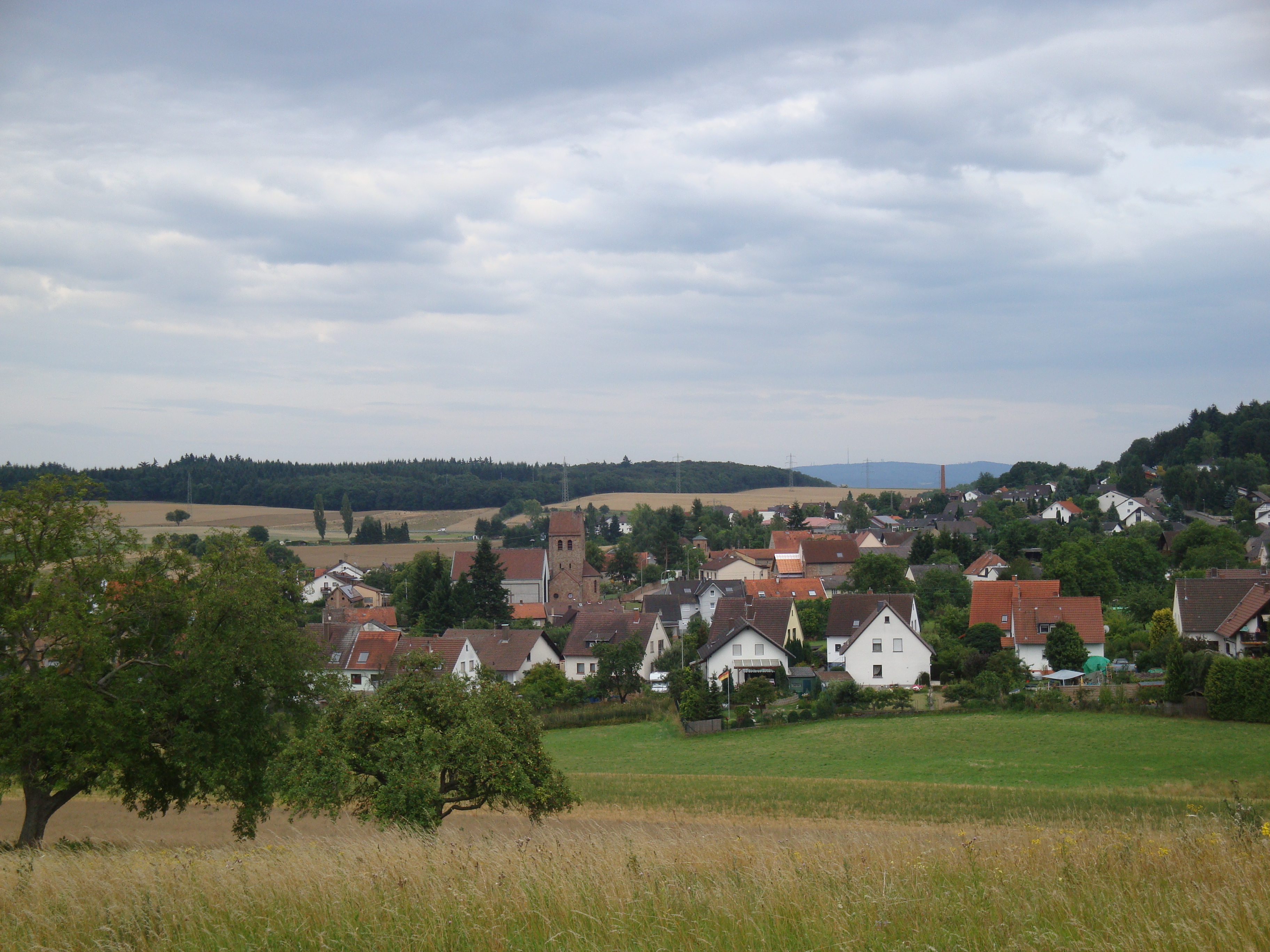 Ansicht des Dorfes aus Nord Westlicher Richtung